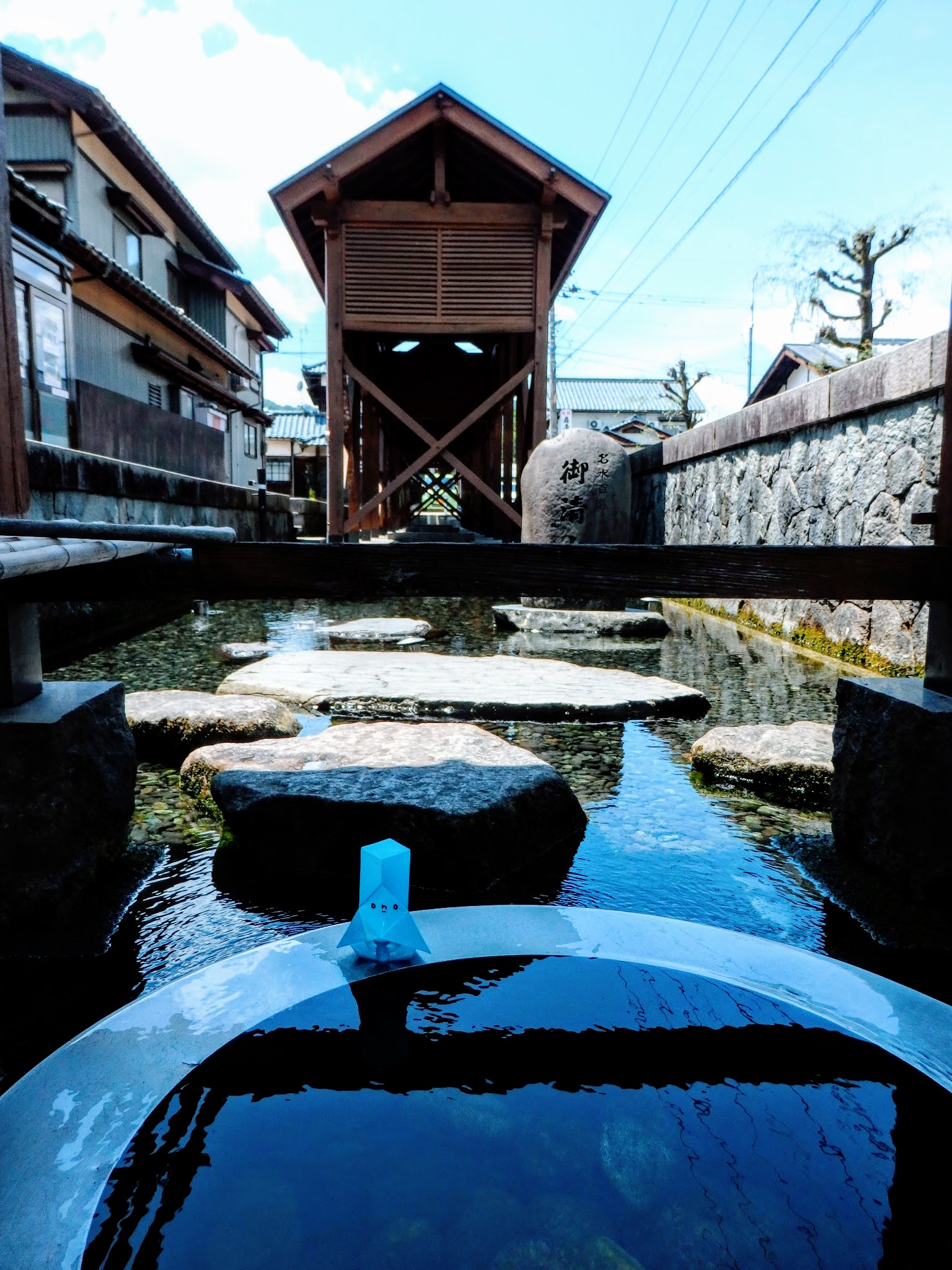 名水百選「御清水」（福井県大野市）